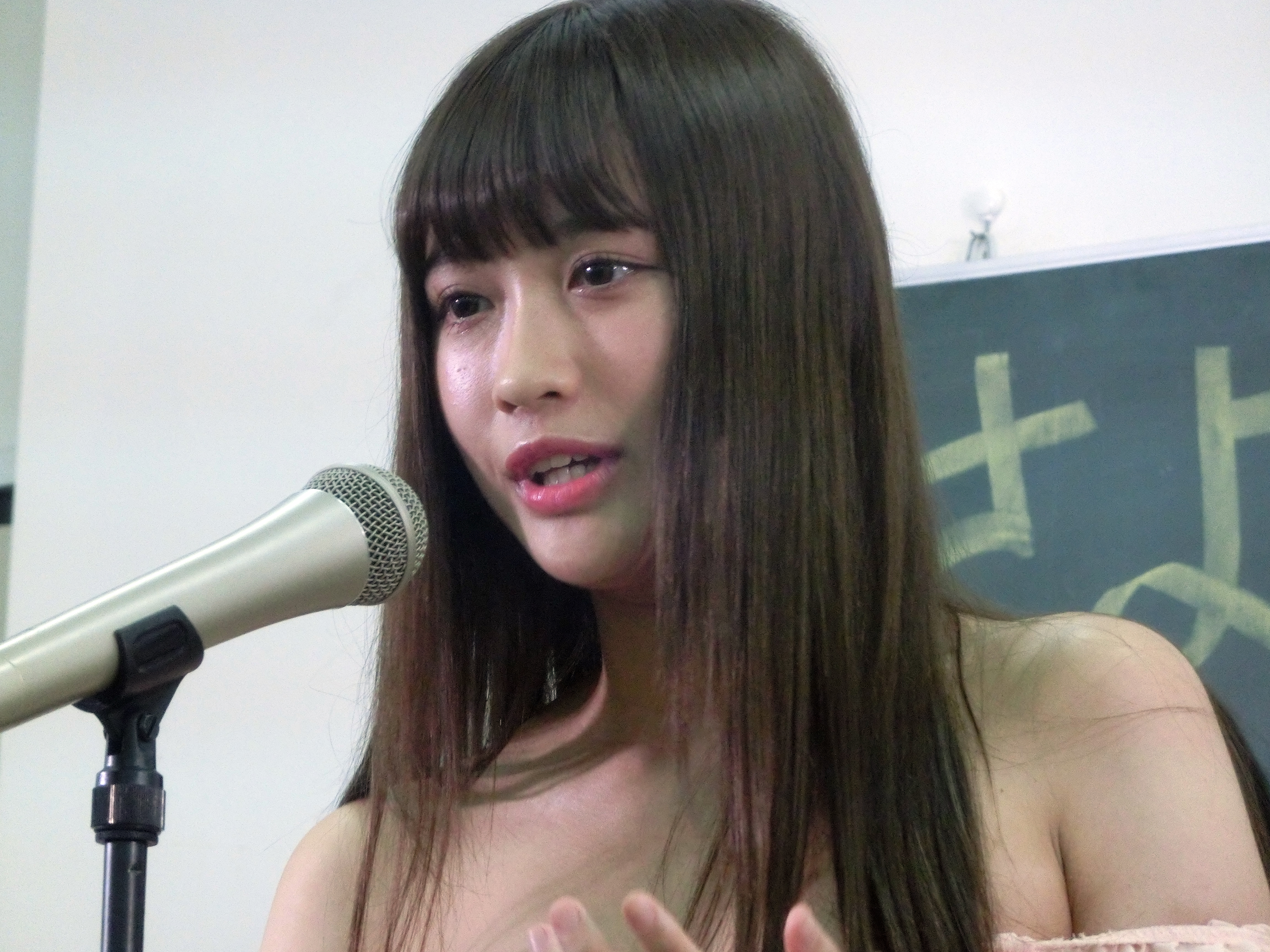 Miss genic 2019